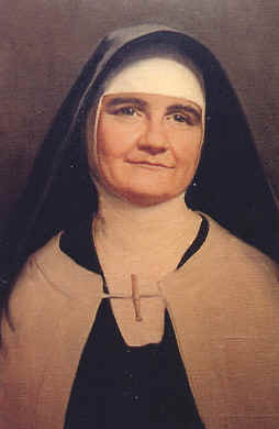 Раба Божия Мария Ангелина Тереза (в миру Бригитта Тереза Мак-Крори), основательница Конгрегации Сестер Кармелиток для Пожилых и Больных. Автор неизвестен.